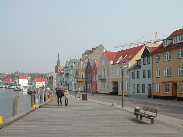 Hafen von Sonderburg, Blick vom Sonderburger Schloss in Richtung Norden entlang des Alsensundes, dort verläuft die Havnegade, die Hafenstraße. Im Sommer legen hier oft große Segelboote an, und hier kann man in den Gaststätten draußen sitzen und die Schiffe beobacheten, die hier durch die Meerenge zwischen Jütland und Alsen fahren. Ebenso reizvoll sind die Seitenstraßen.